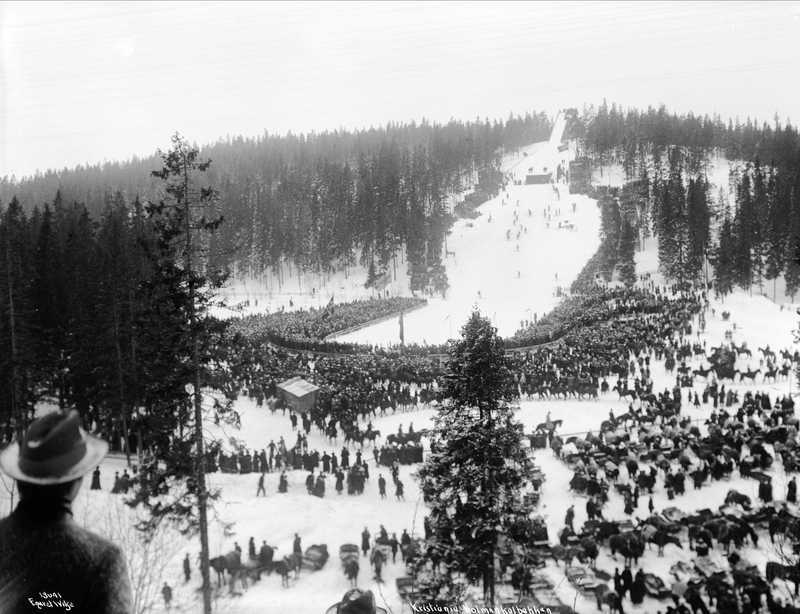 Holmenkollbakken